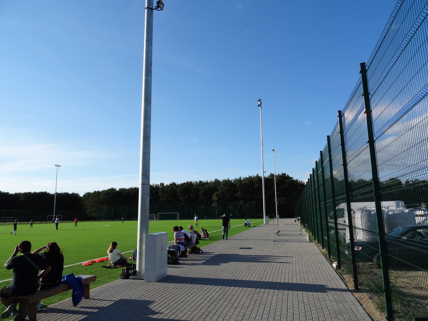 Stadion przy ul. Sielskiej w Bydgoszczy (dzielnica Fordon), należący do klubu Zawisza Bydgoszcz, niegdyś Wisła Fordon